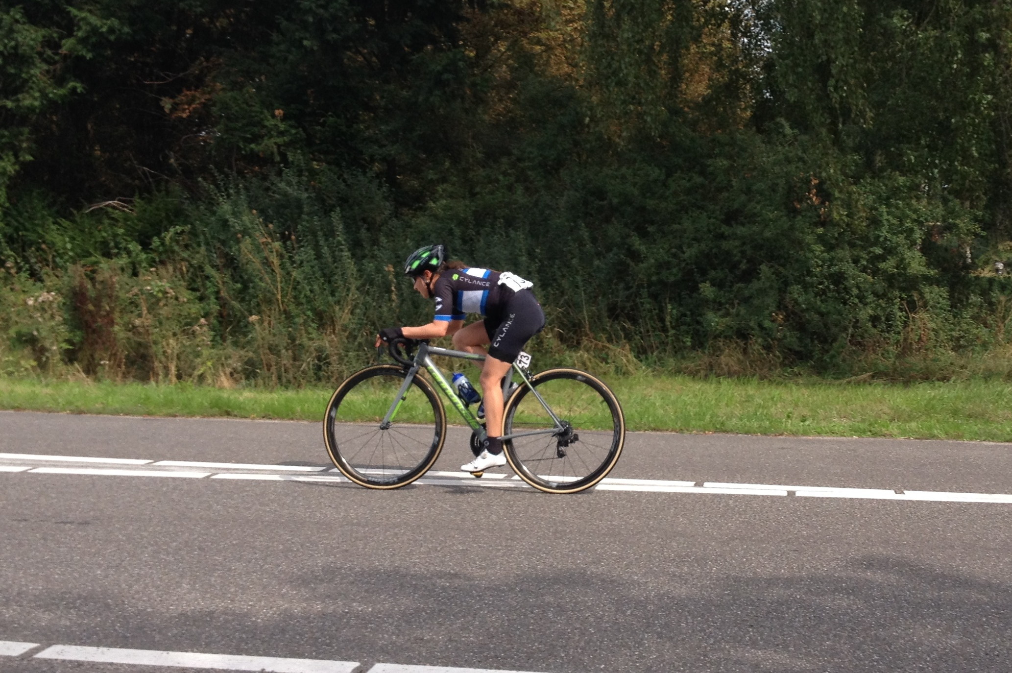 4e etappe van de Boels Ladies Tour 2018 door Noord-Limburg, van Stramproy naar Weert.